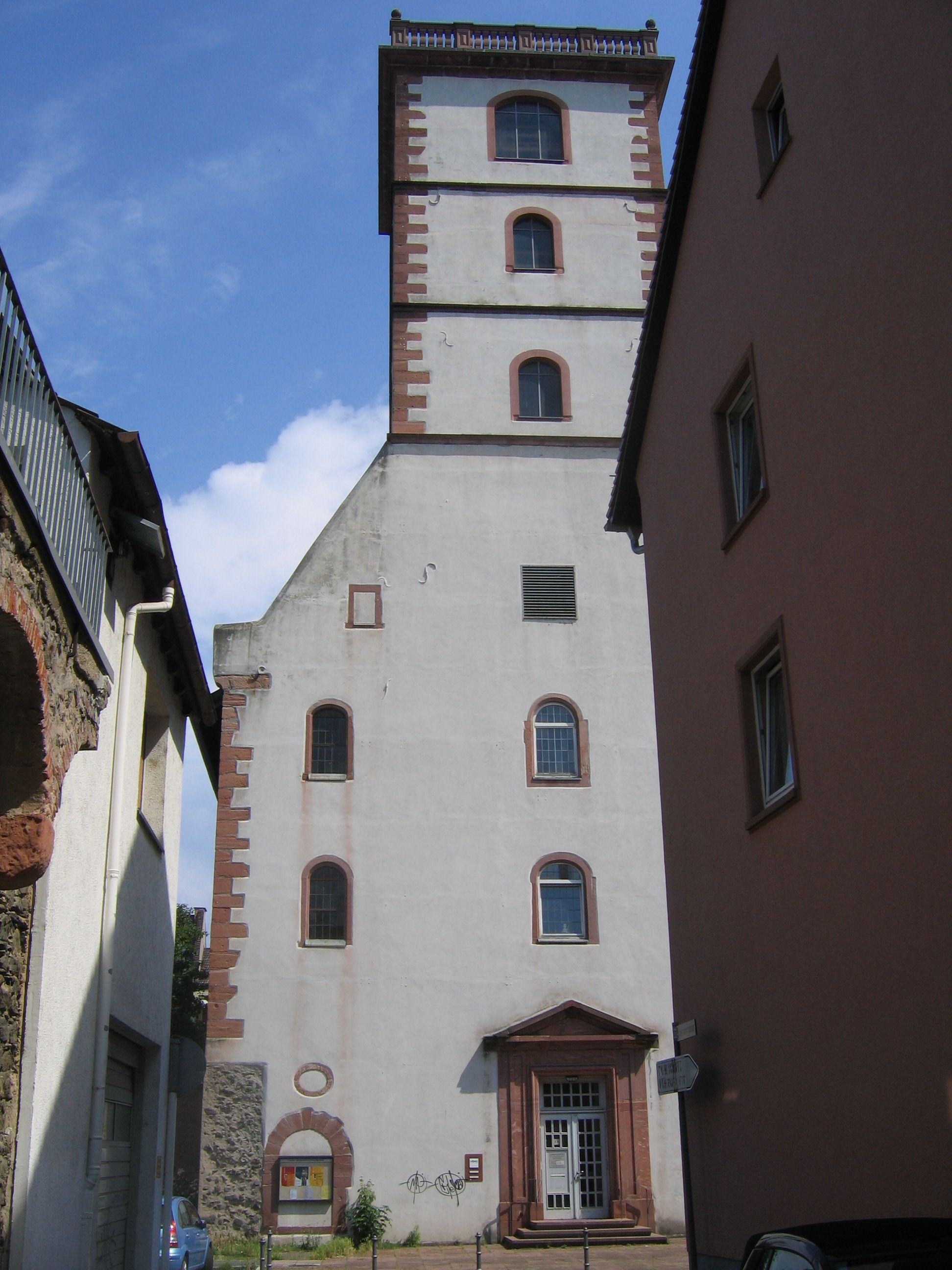 Alte Johanneskirche (Hanau) Südseite, Johanneskirchplatz